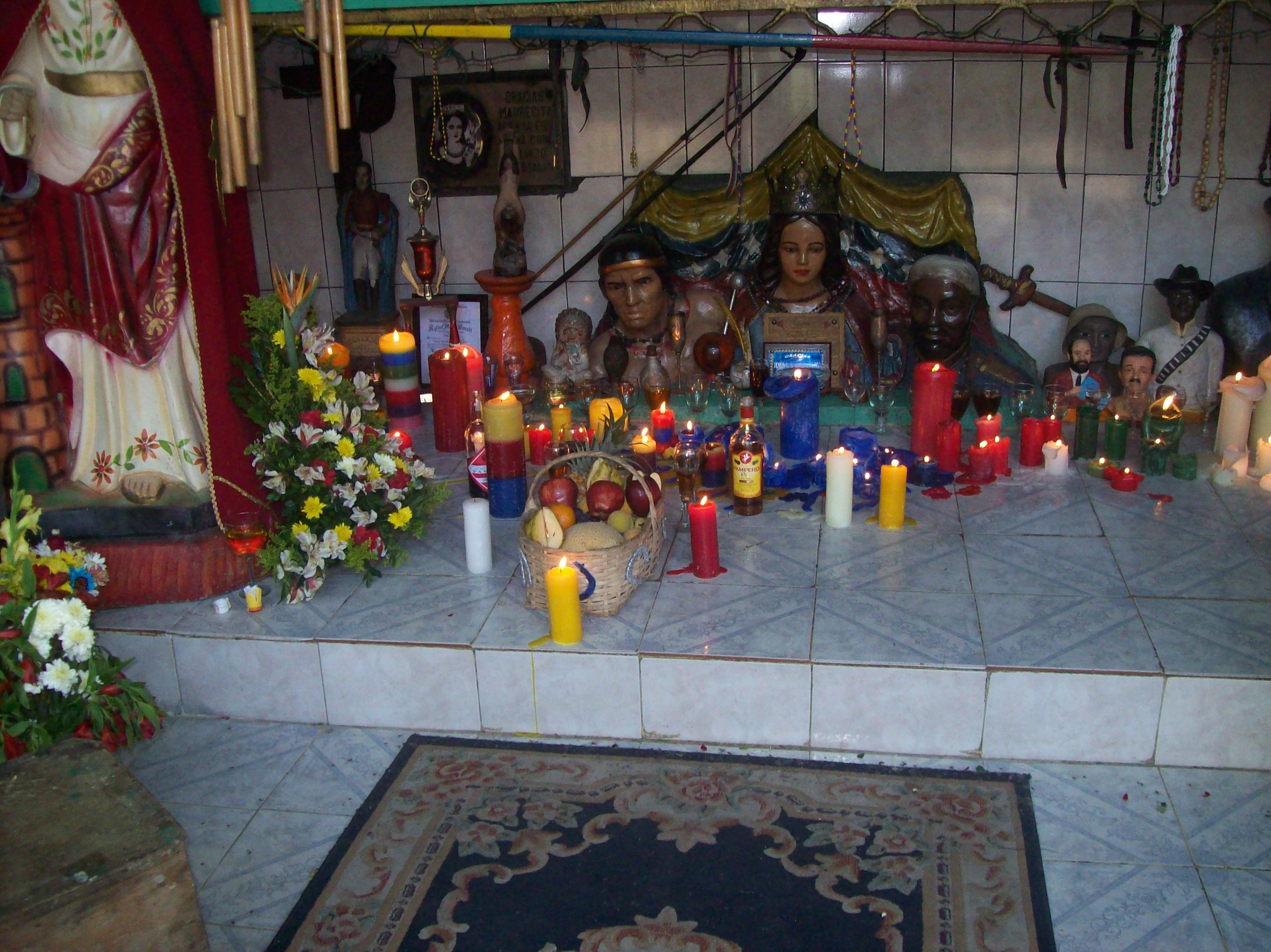 Altar Mayor Quibayo